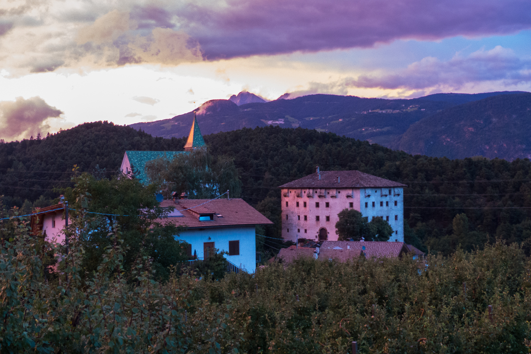 "Blue Hour" in Prissian, Ferienwohnung Gamper, Jakobsweg zwischen Meran und Bozen, Südtirol, Italien